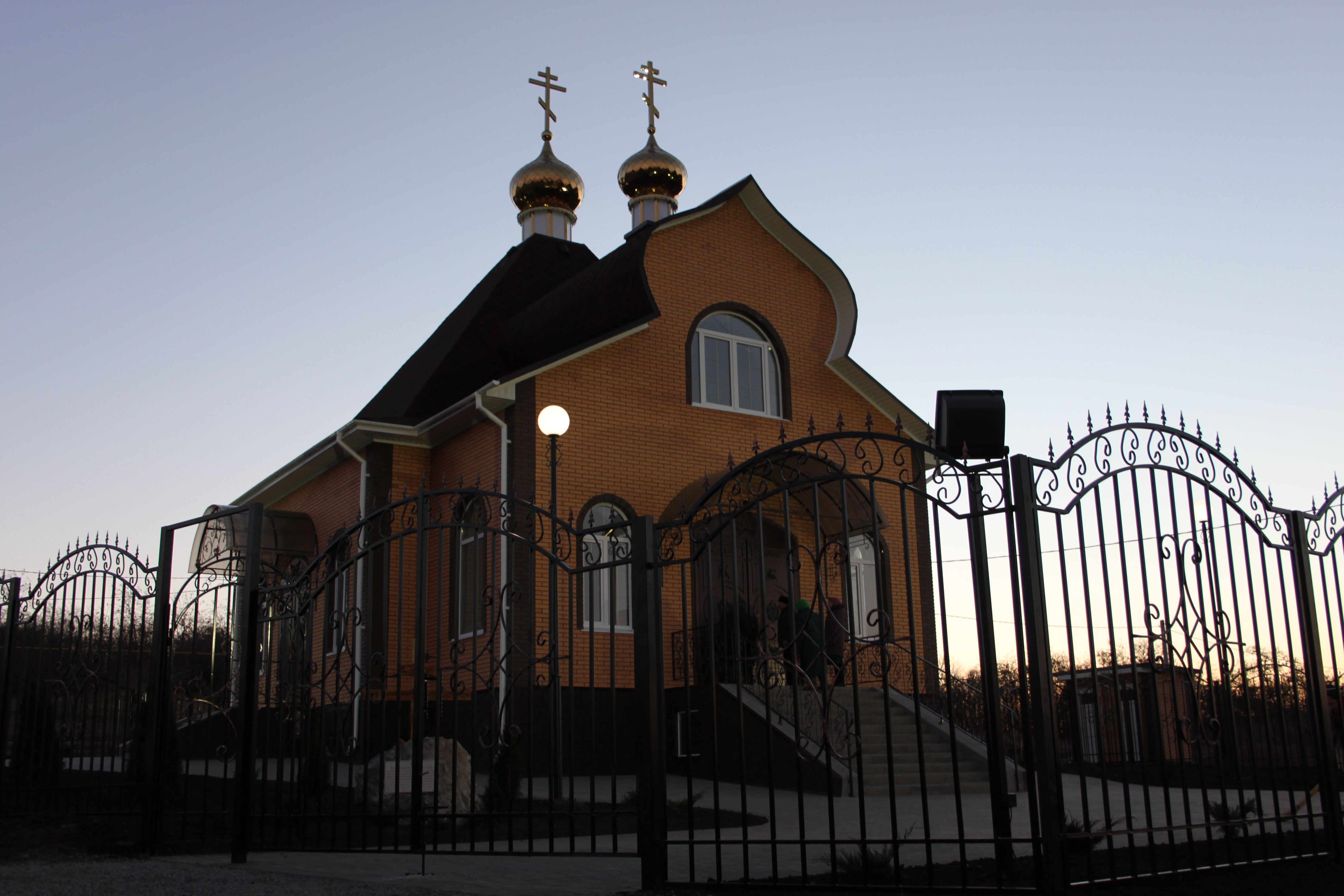 в день освящения храма 21 ноября 2014 года